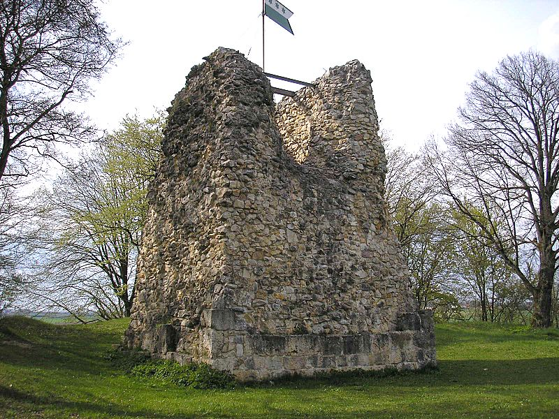 Burg Güssenburg, Ruins of Inner Keep